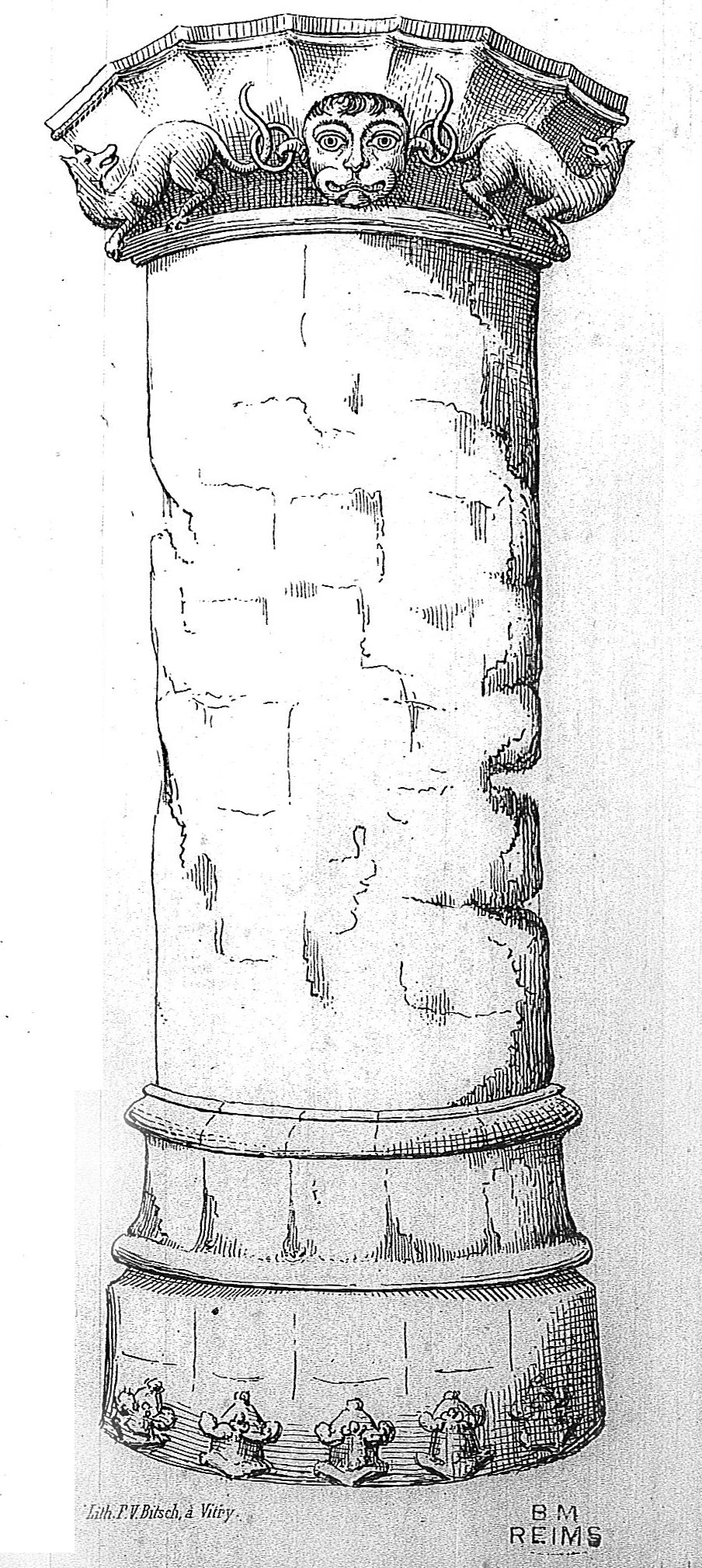 vue d'une colonne à Lignon par BLitsch .